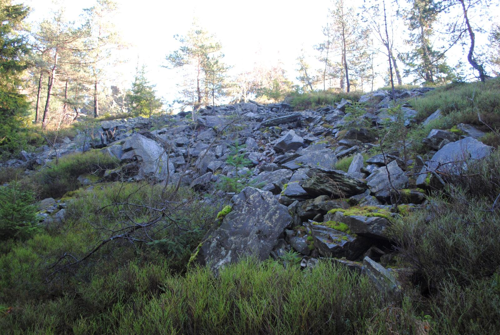 Blockhalde unterhalb des Vysoký kámen